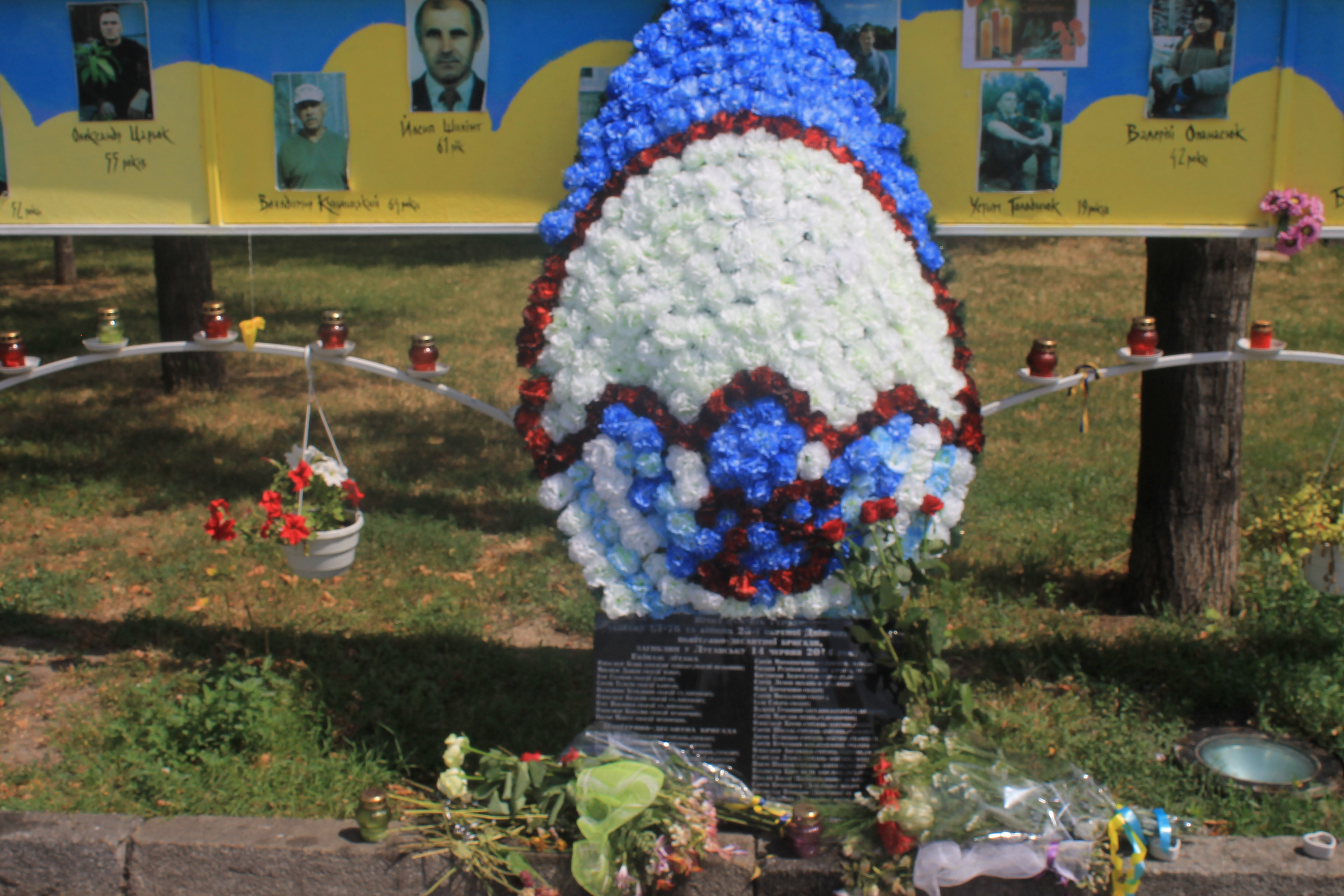 Пам'ятний вінок воїнам 25-ї повітряно-десантної бригади, загиблим внаслідок збиття літака ІЛ-76 проросійськими терористами на стіні Небесної сотні в Дніпропетровську